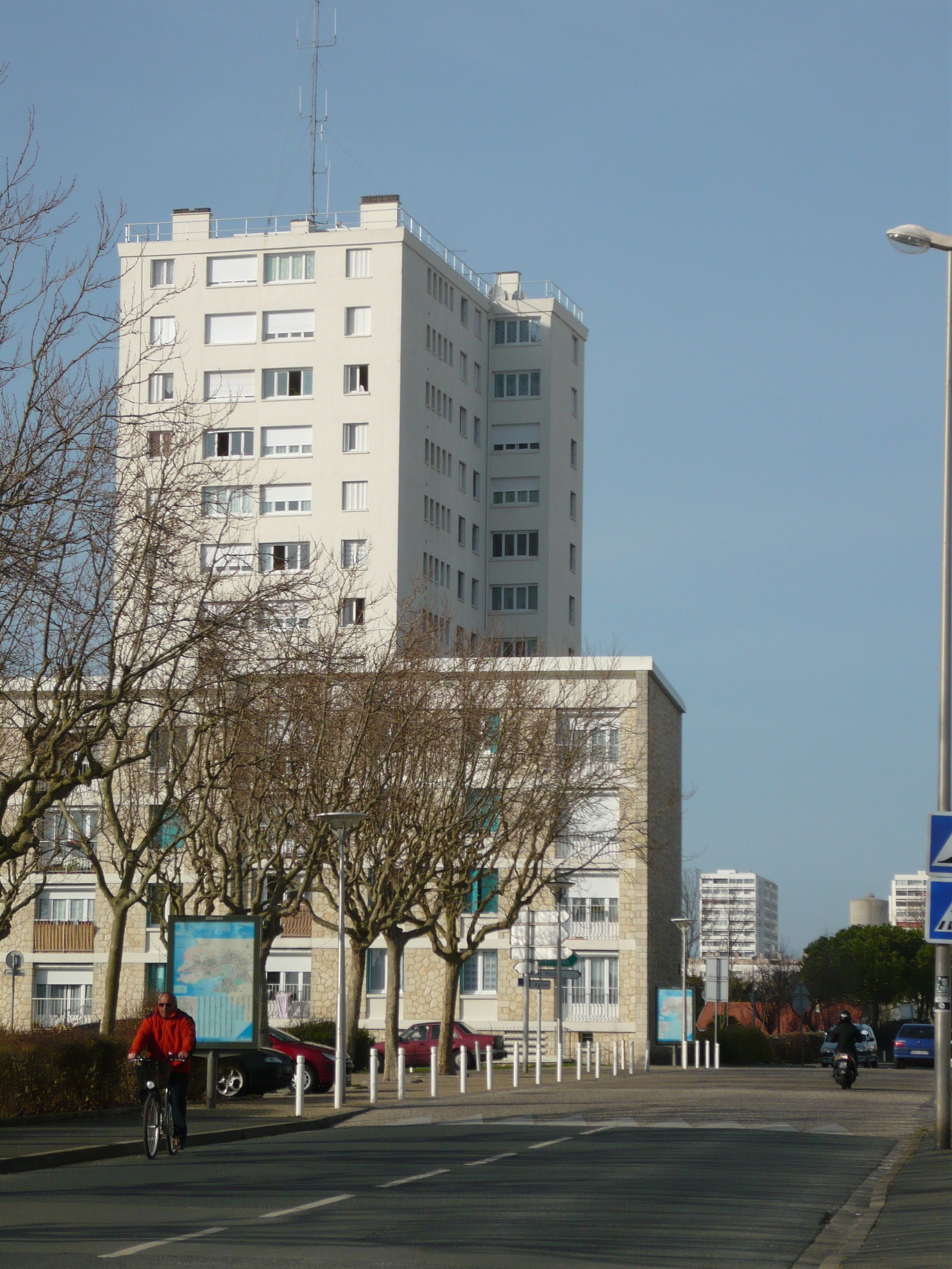 Les tours et immeubles barres de Port-Neuf, premier quartier urbanisé dans les années d'après-guerre à La Rochelle (17).